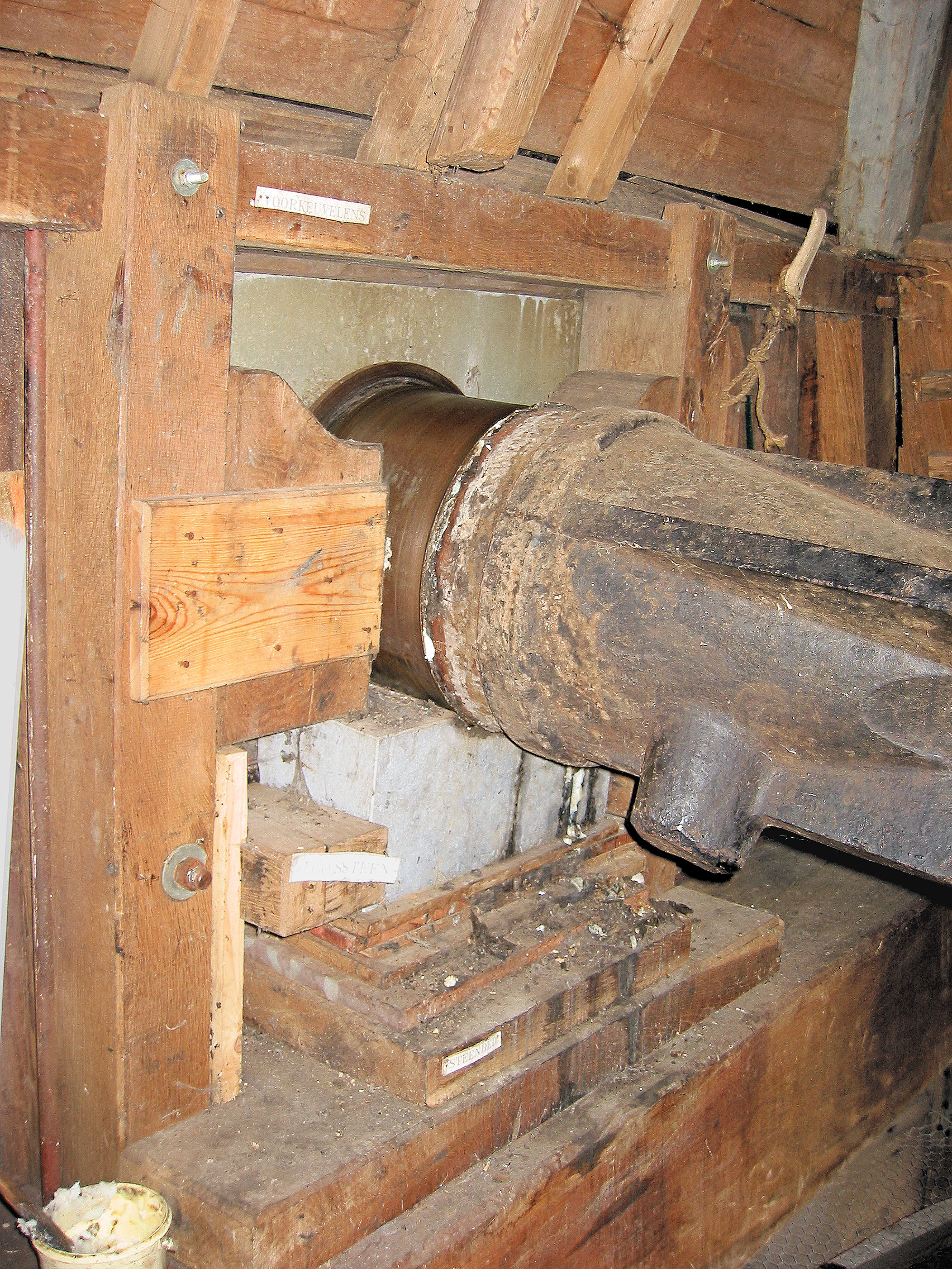 Molen De Zwaan halslager met steenbed, Lienden, Gelderland, the Netherlands